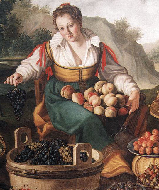 detail